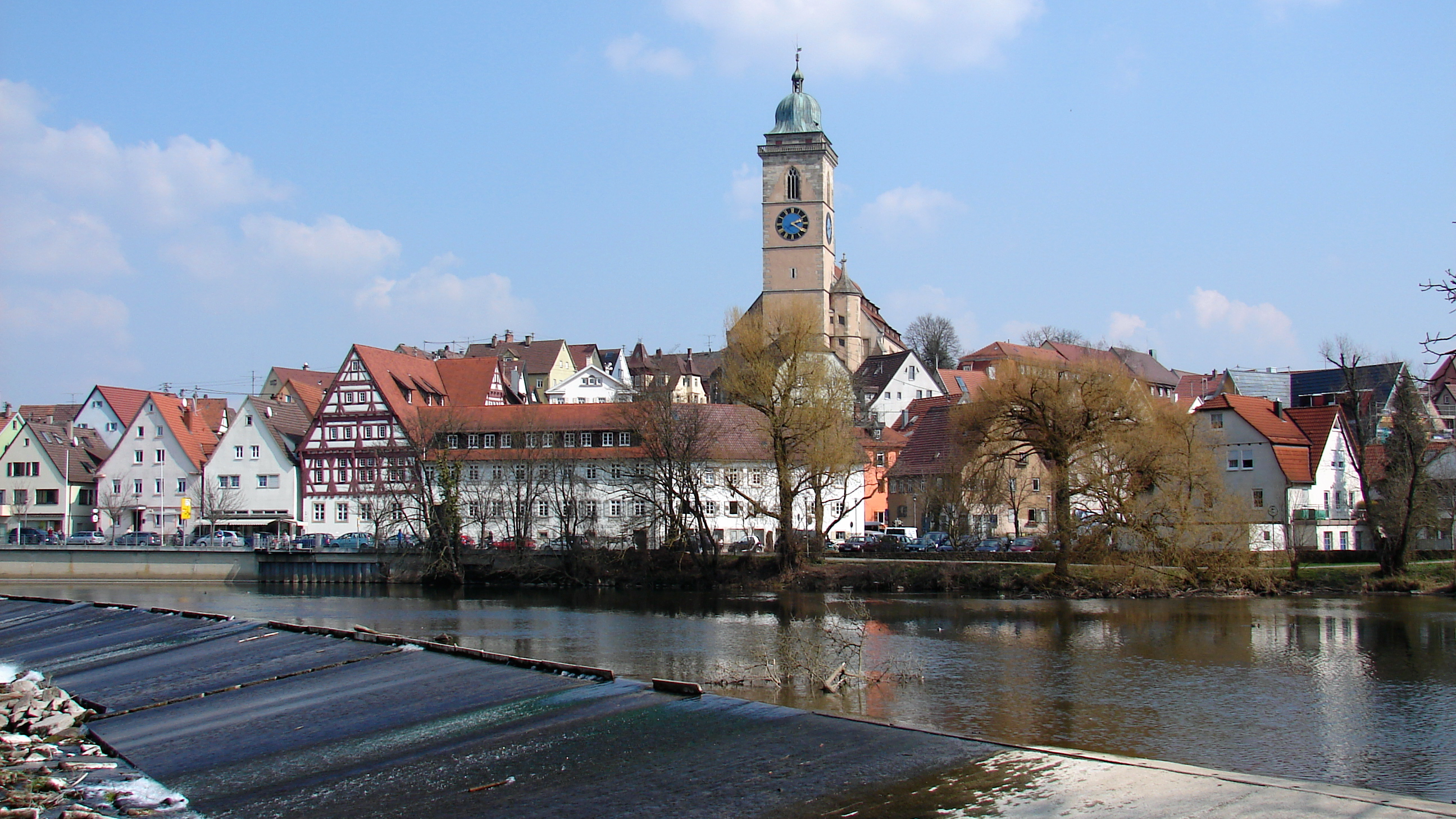 Neckarfront von Nürtingen mit der Laurentiuskirche